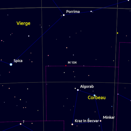 Carte du ciel positionnant la galaxie M104 dite du Sombreor